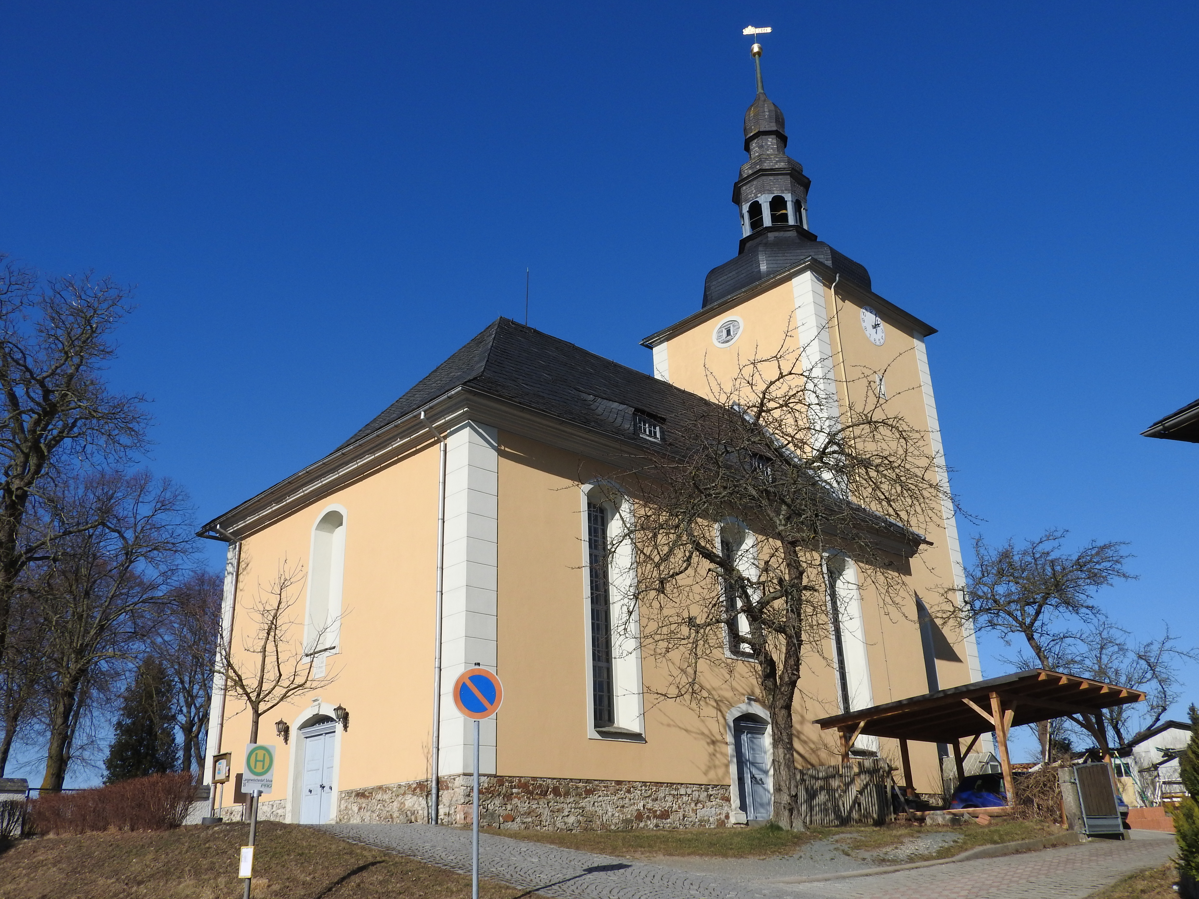 Kirche in Langenwolschendorf, Thüringen